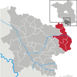 Amt Kleine Elster (Niederlausitz) in Brandenburg (Country) - District Elbe-Elster